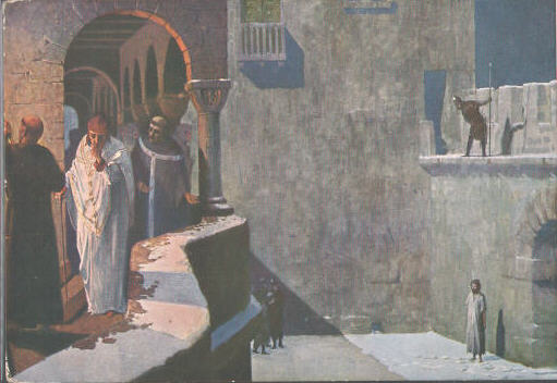 Kaiser Heinrich IV. und Papst Gregor VII. in Canossa, Schulbild von C. C. Meinhold nach einem Gemälde von Michael Zeno Diemer